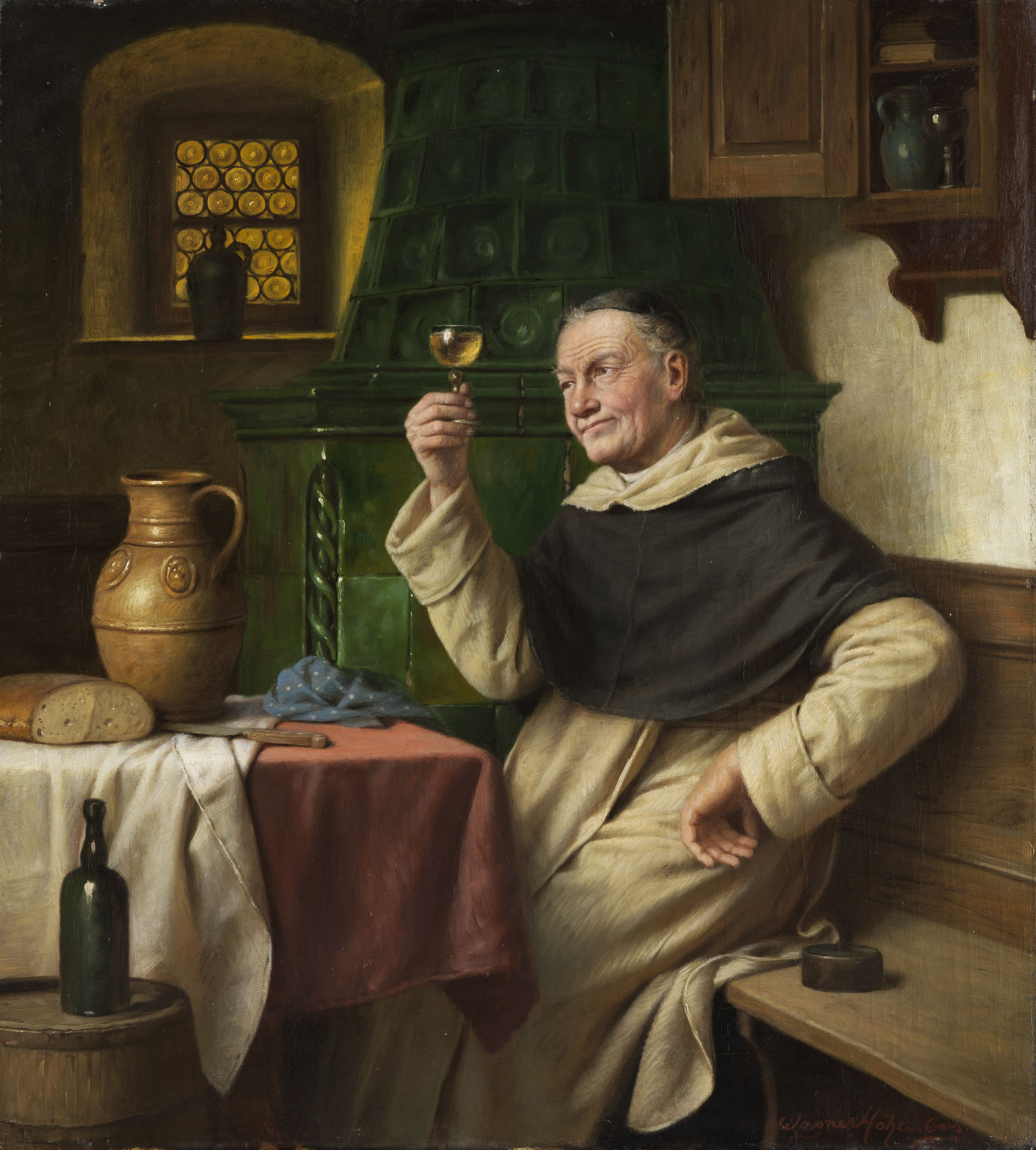 Mönch bei der Weinprobe. Öl auf Leinwand. 58,5 x 52,5 cm. Rechts unten signiert.